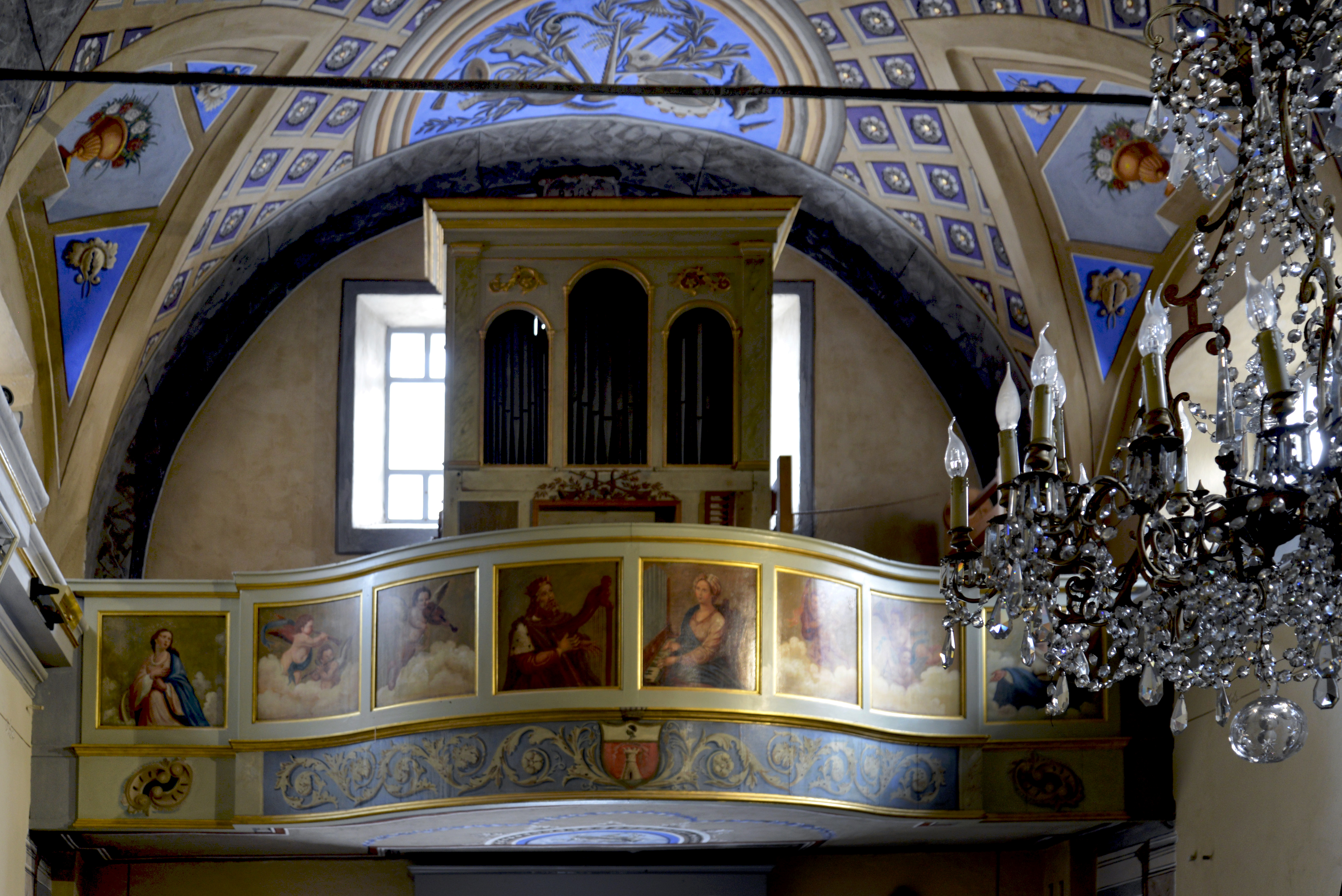 Corte, Centre Corse - Orgue de tribune et la tribune d'orgue (classée aux Monuments historiques) de la chapelle Sainte-Croix.